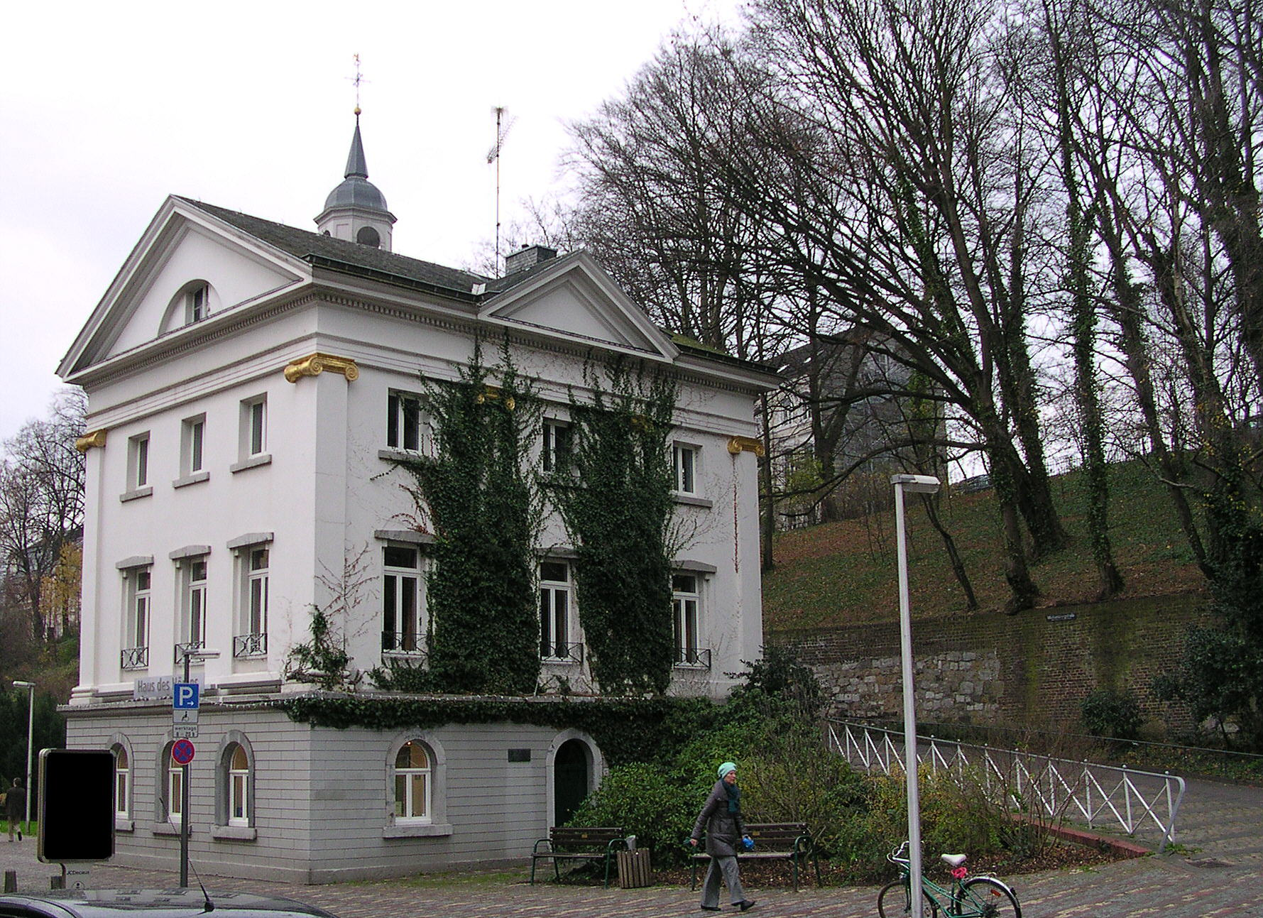 ehemaliges Rathaus von Burtscheid (Aachen)